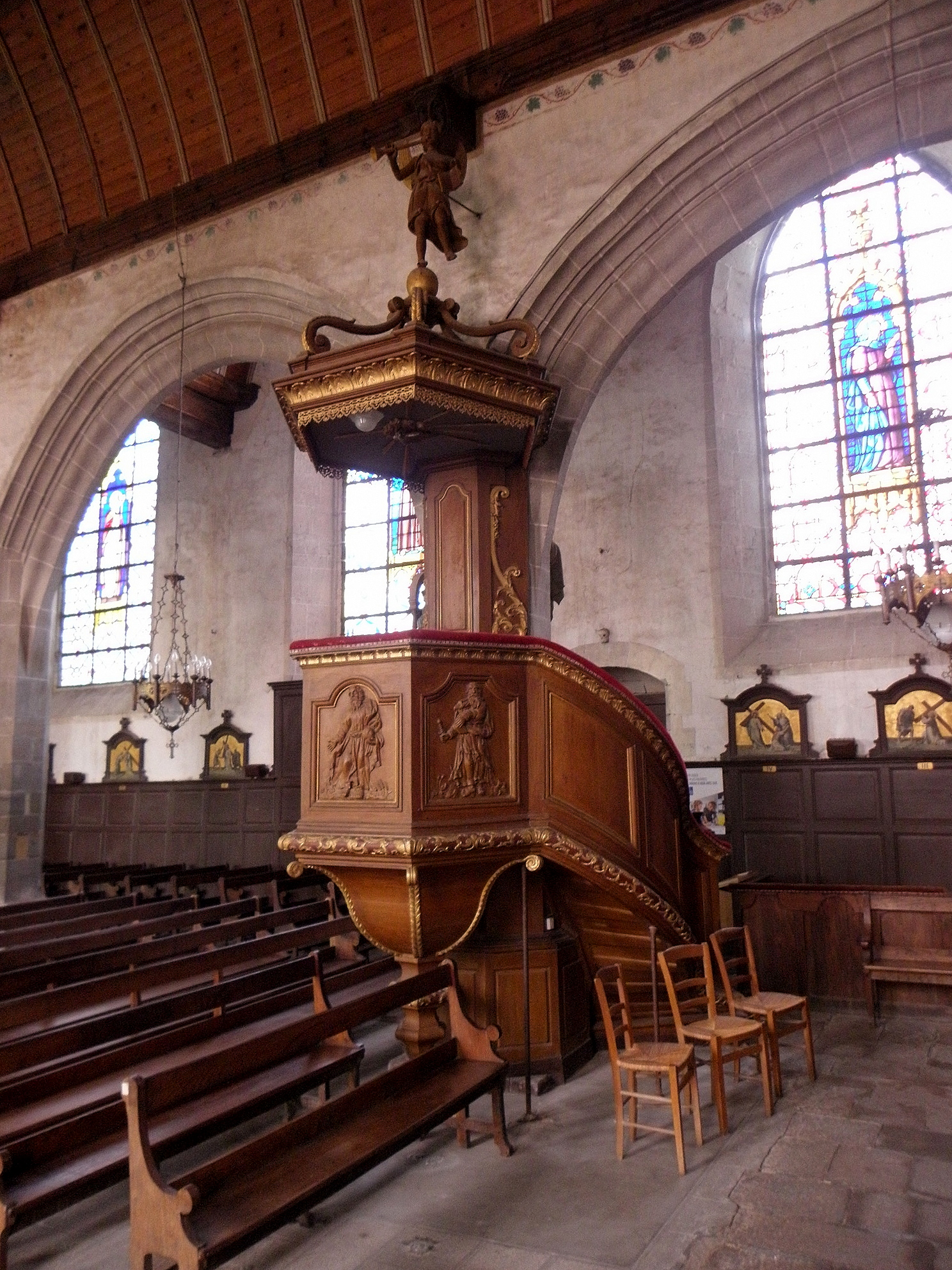 Chaire de l'église Saint-Sulpice de Gennes-sur-Seiche (35).